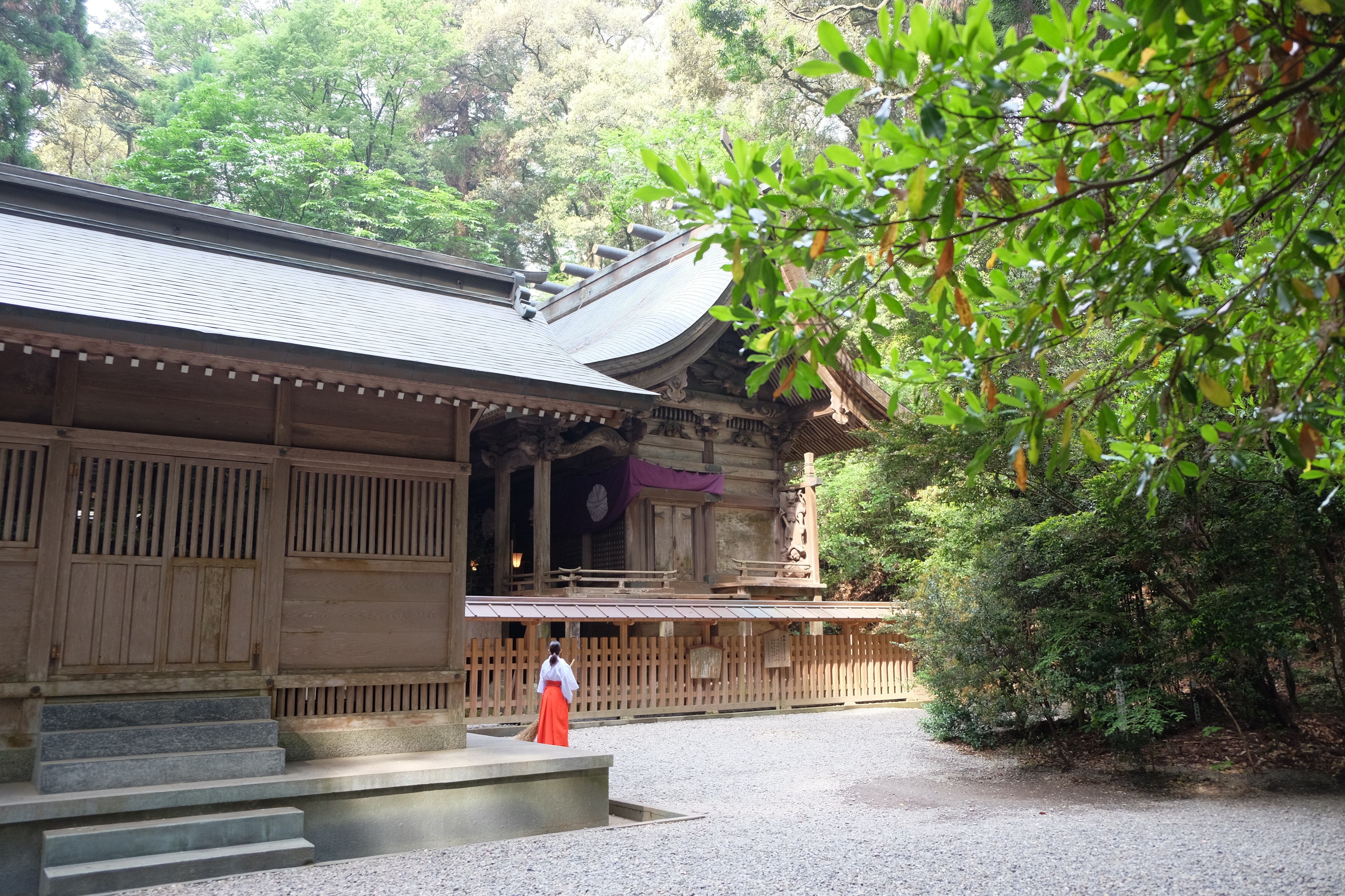 高千穂神社の本殿その2